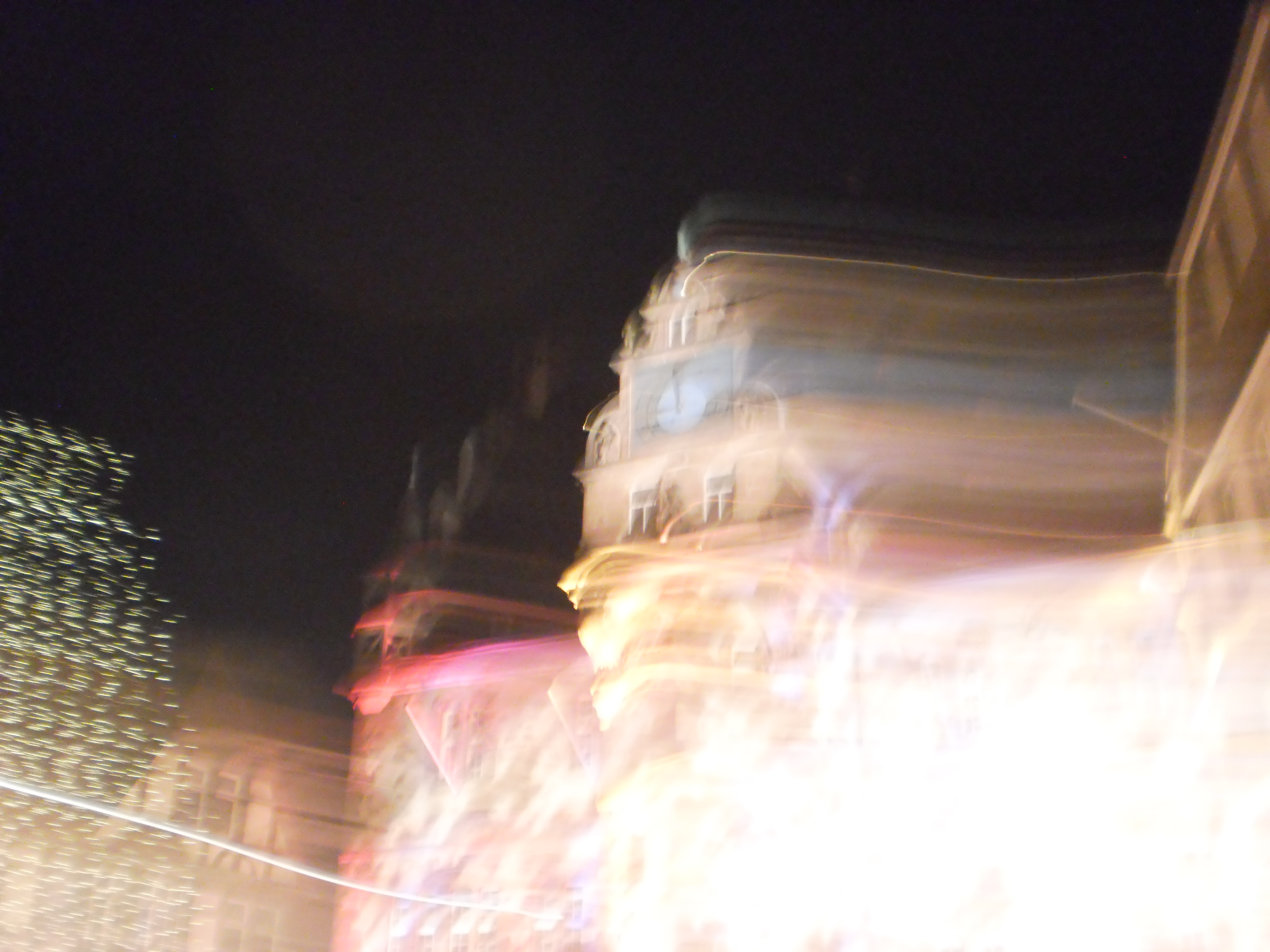 Buntes Wischwisch in der Nacht am Rathaus in Marburg mit Weihnachtsbaum im November 2016 während der Stadtraum-Illumination zum Einkaufserlebnisabend Marburg b(u)y Night. Der historische Sitz der Stadtverwaltung ist optisch zum Weihnachtsbaum etwas hin verschoben. Diese Verwischung des Bildes mittels Langzeitbelichtung steht für die Illusion und Manipulation von Inszenierungen und die Vergänglichkeit der nur kurzzeitig schönen Bilder; hier an diesem Abend auf dem vom alkoholischen Dunst des Glühweins getränkten Marktplatz dieser Stadt. Weitere Fotos: Category:Marburg b(u)y Night↓